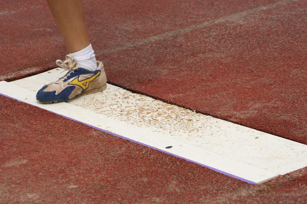 Planche d'appel saut en longueur athletisme Long jump